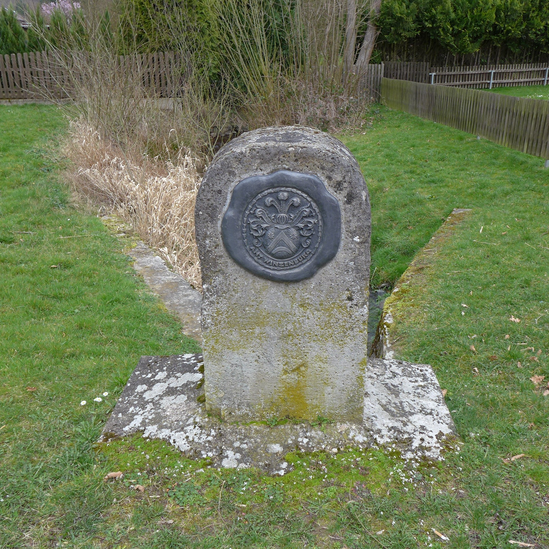 Winzenburg Amt Winzenburg